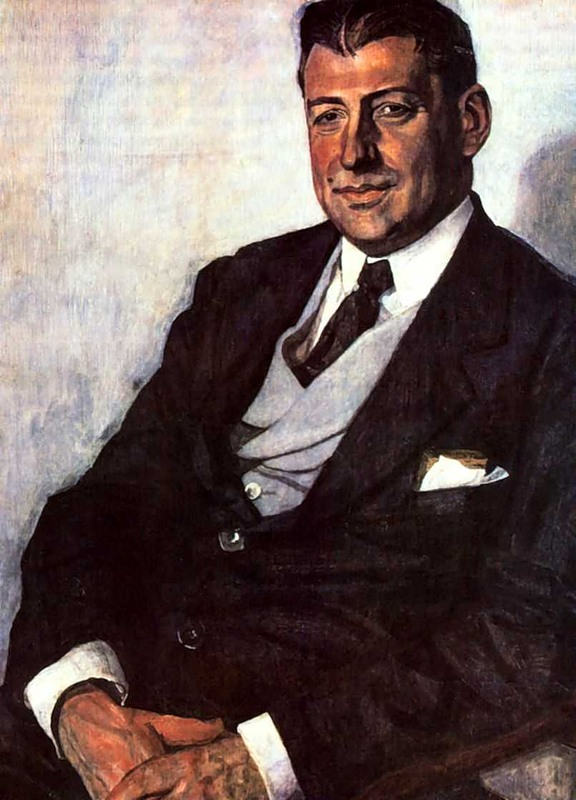 Головин Александр. Портрет Ю.М.Юрьева. 1923